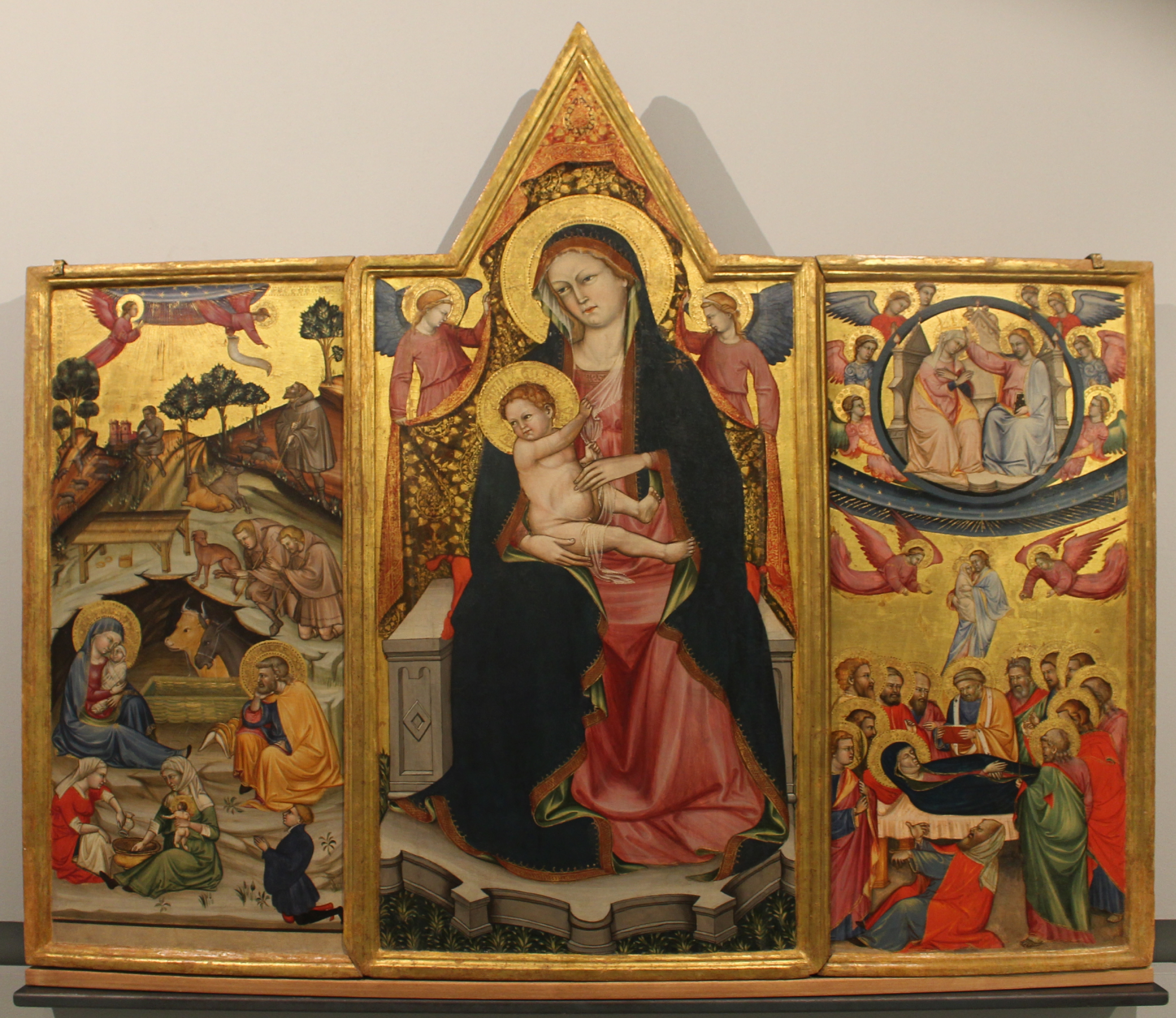 Tempera su tavola con fondo oro. Museo nazionale d'Abruzzo, L'Aquila; proveniente dalla chiesa di Santa Maria del Ponte in Tione degli Abruzzi (AQ).